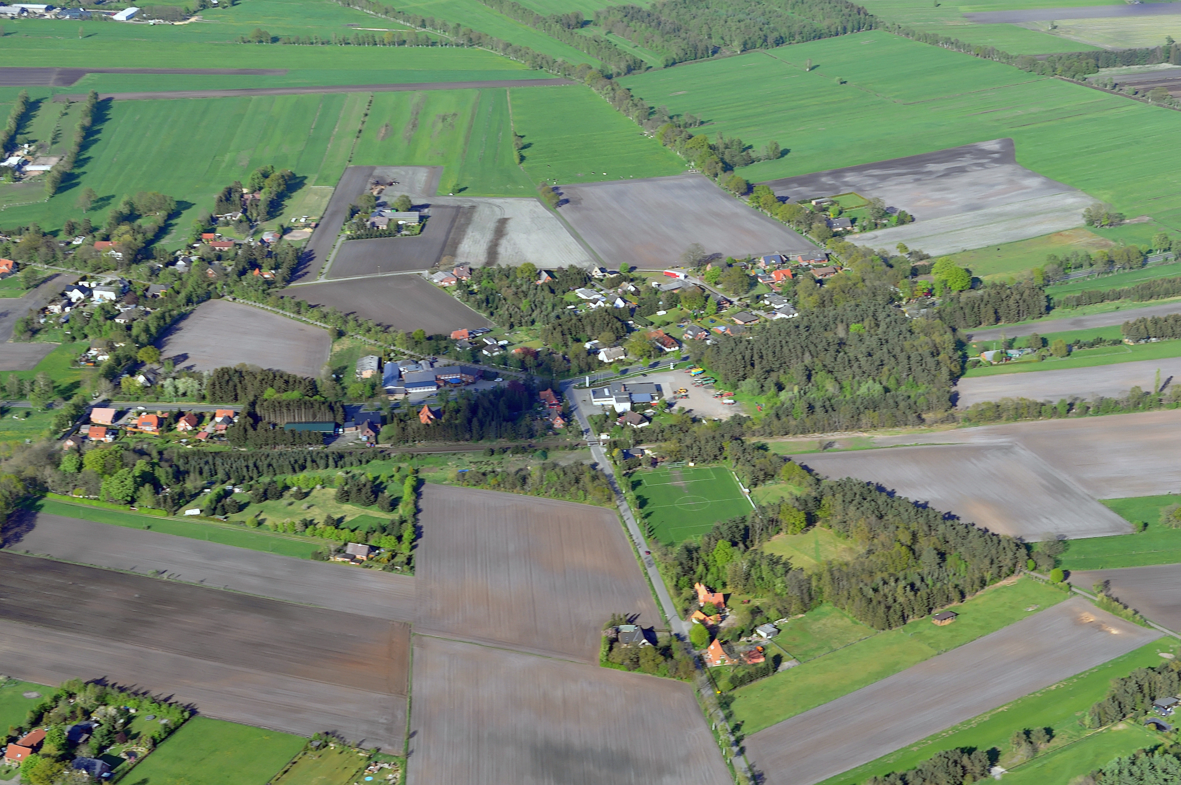 Luftbilder von der Nordseeküste 2012-05